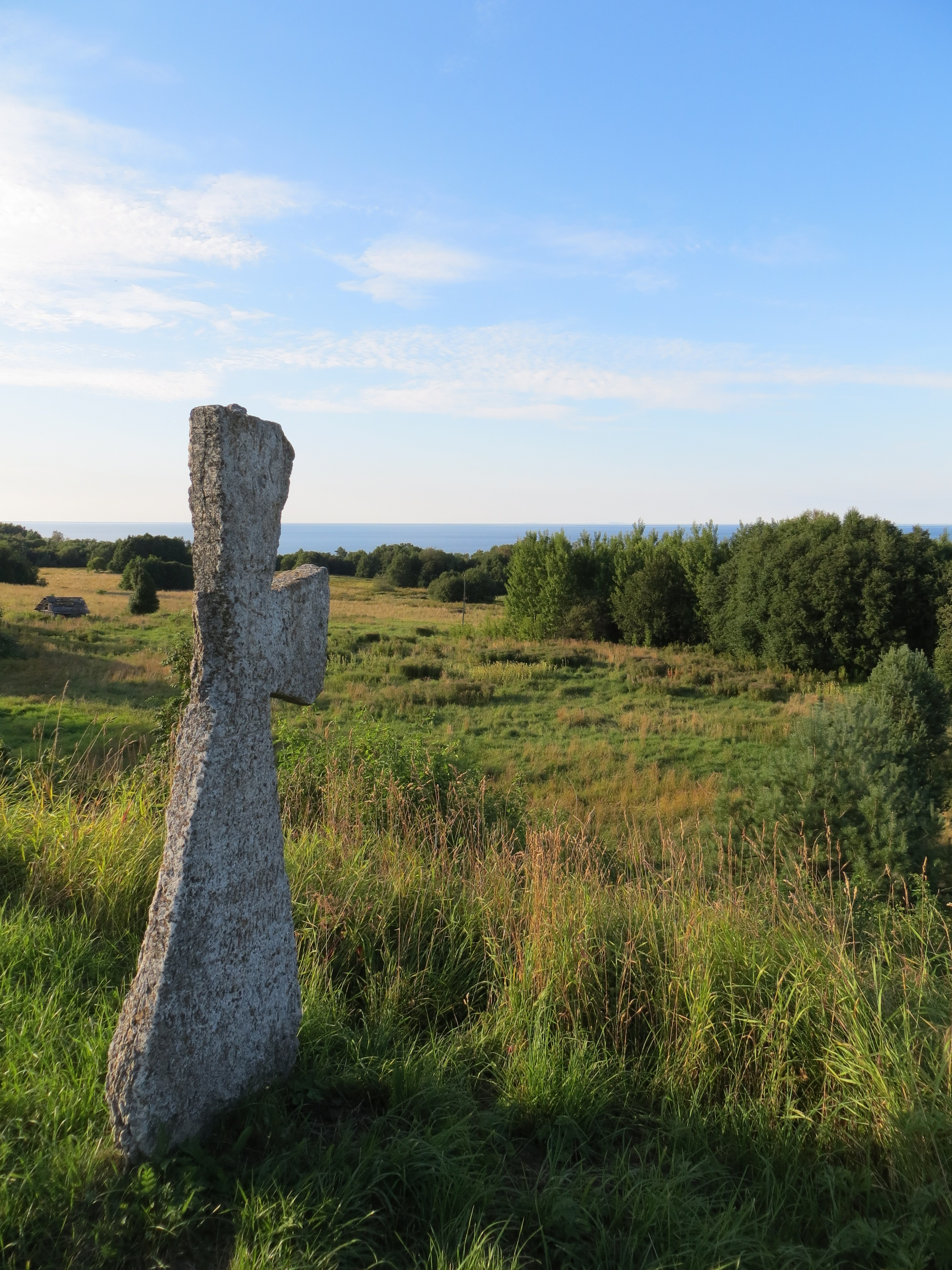 Kõrkküla kivirist